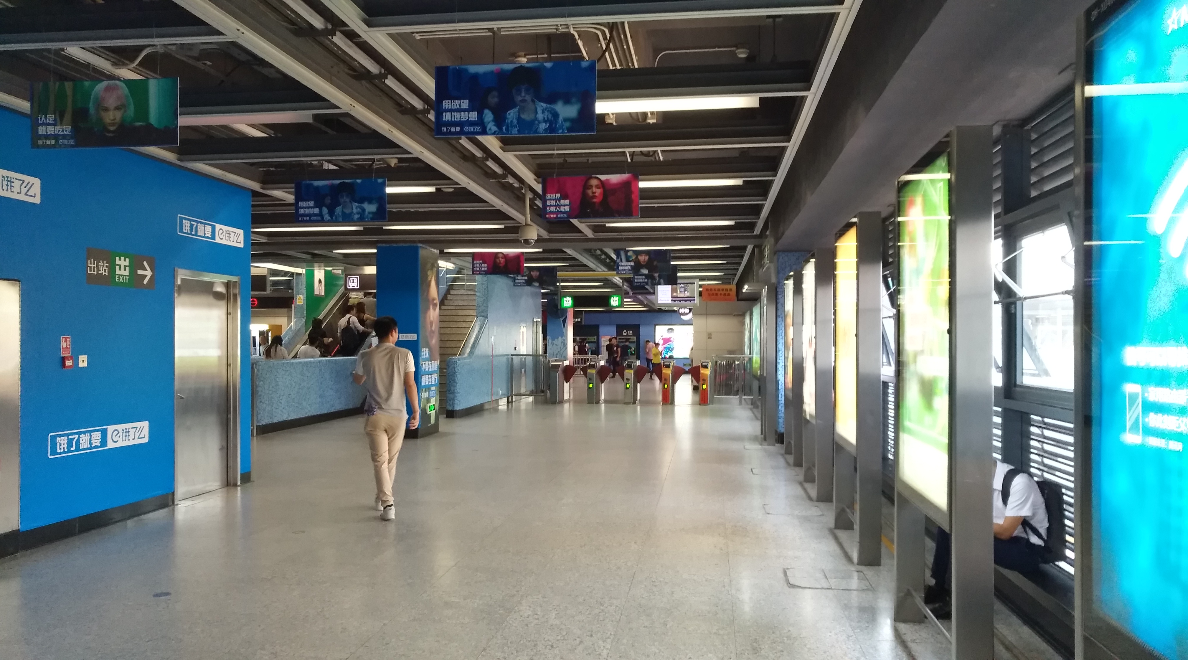 深圳地铁 4号线 清湖站 大堂